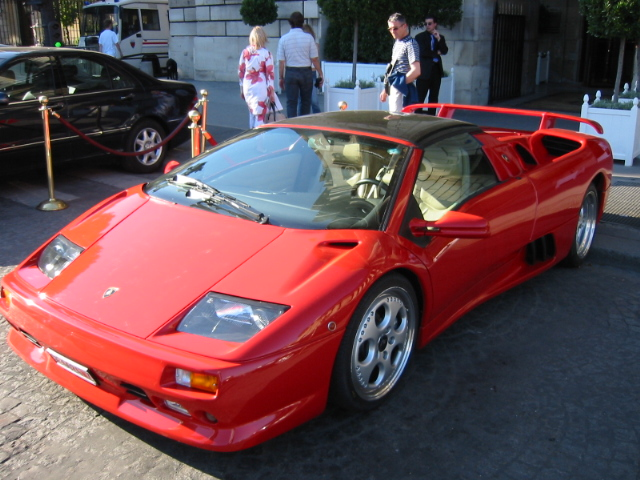 Lamborghini Diablo - Hotel Crillon à Paris